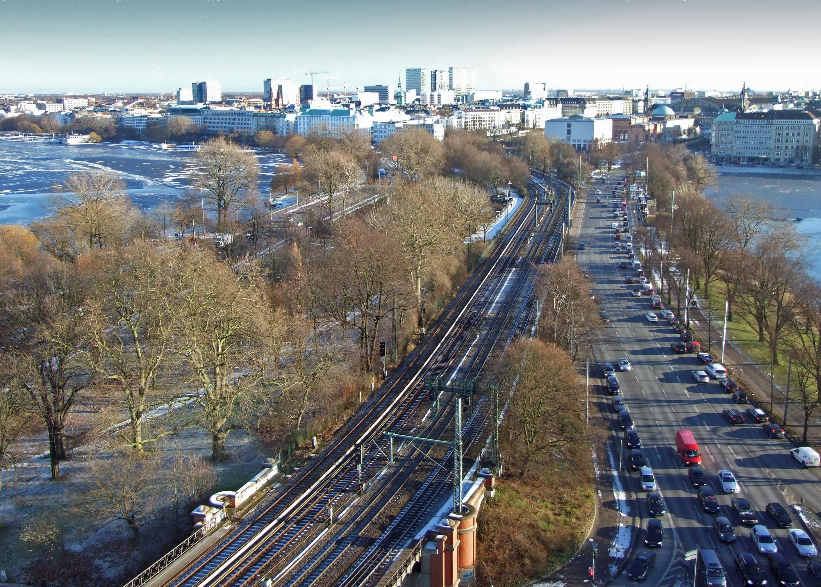 Lombardsbrücke und Kennedybrücke in Hamburg This is a photograph of an architectural monument.